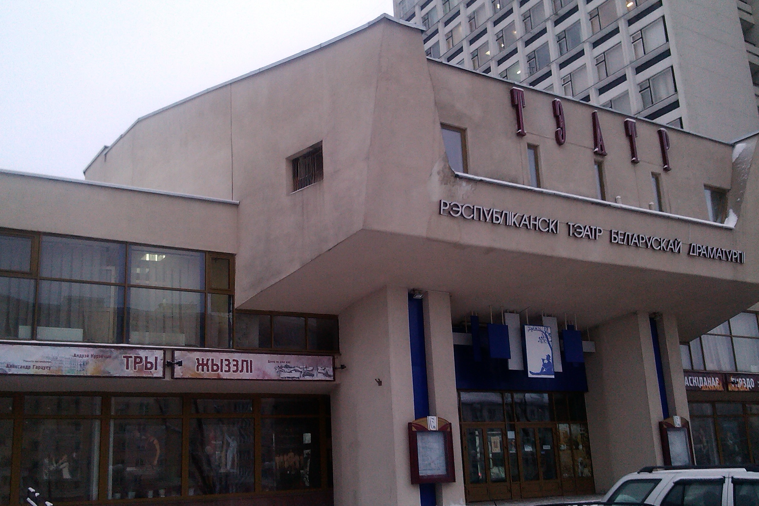 Пьесса "Три Жизели" Андрея Курейчика в Республиканском театре белорусской драматургии. Минск, Январь 2013 года.